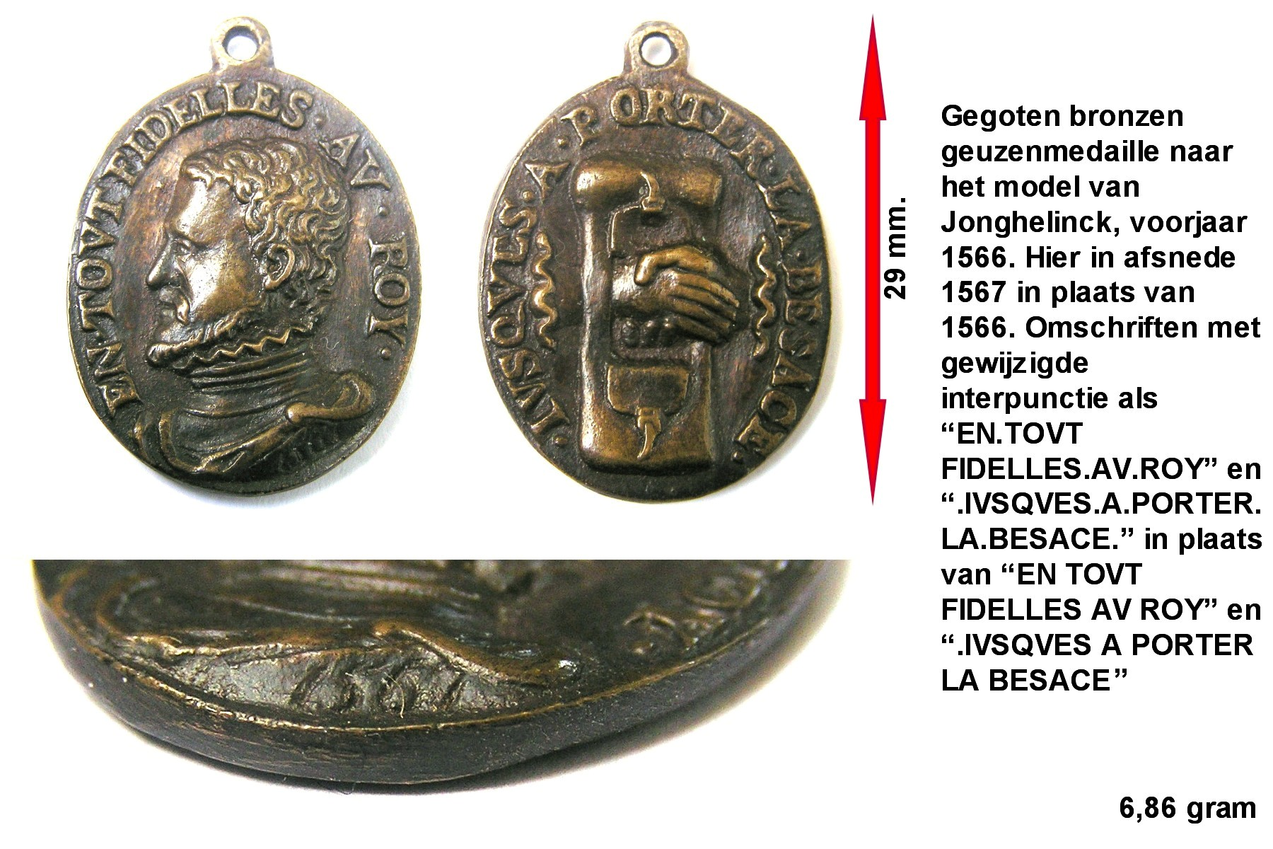 Bronzen geuzenpening 1567